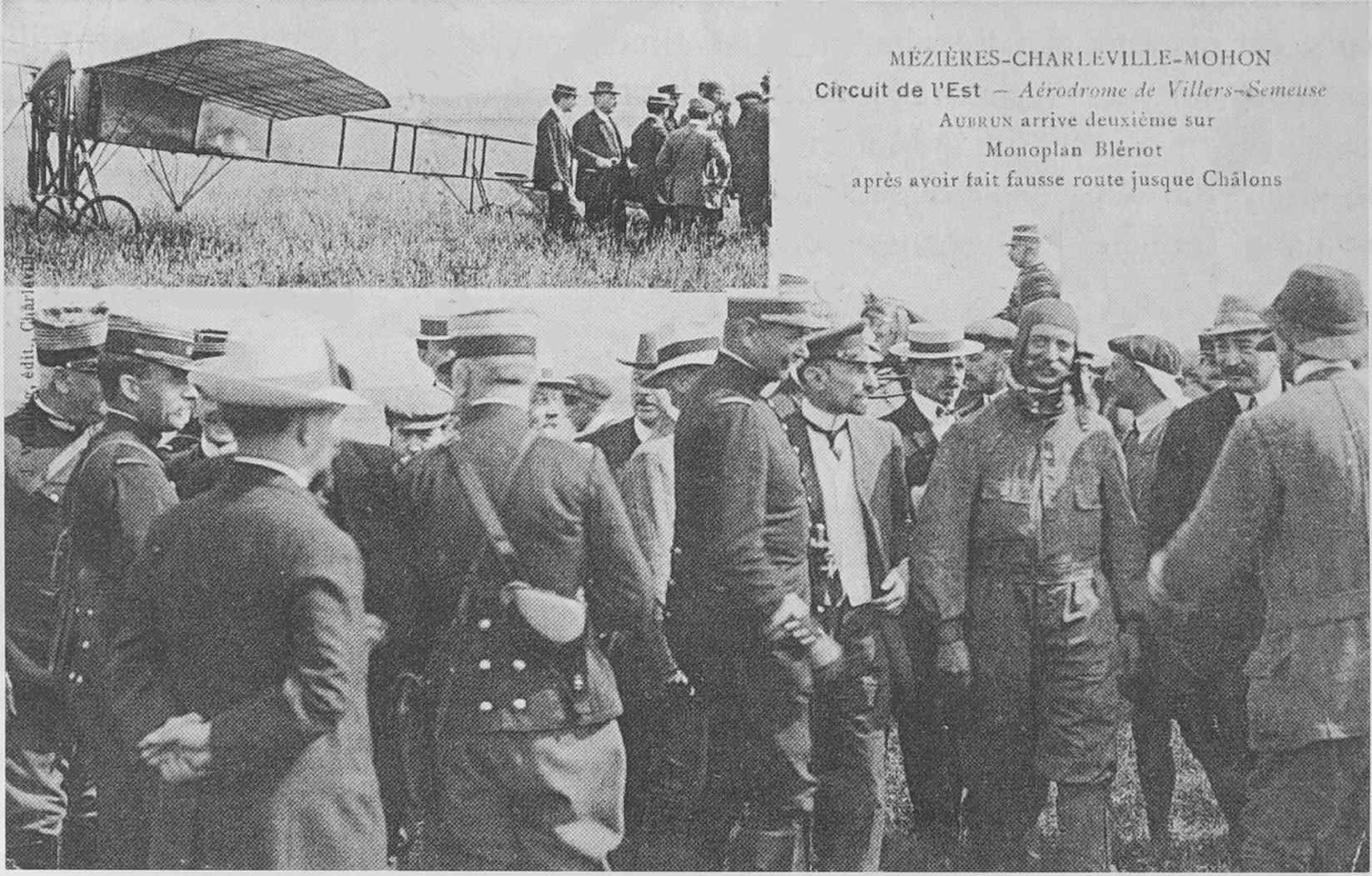 Circuit de l'est 1910 Charleville Mézières.